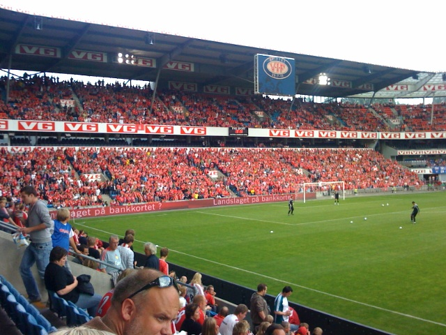 Vålerenga - Liverpool at Ullevaal stadion